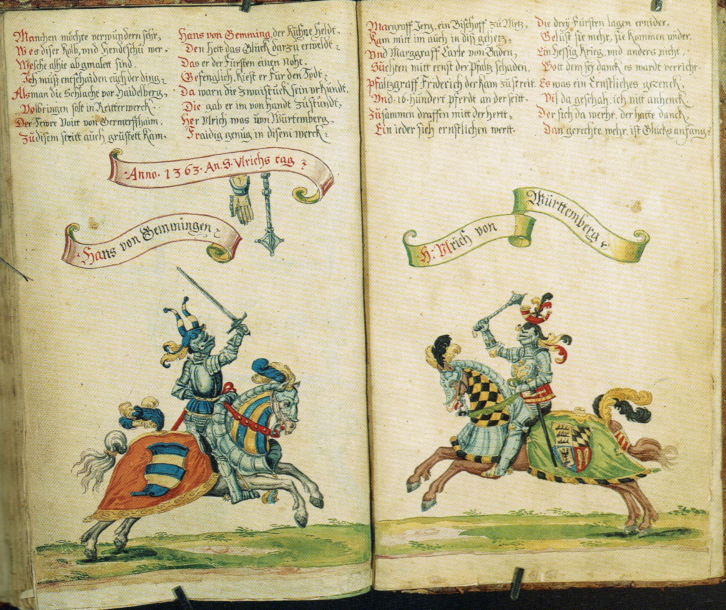 hans von Gemmingen besiegt den Grafen Ulrich von Württemberg in der Schlacht bei Seckenheim (1462). Archiv der Freiherren von Gemmingen-Hornberg